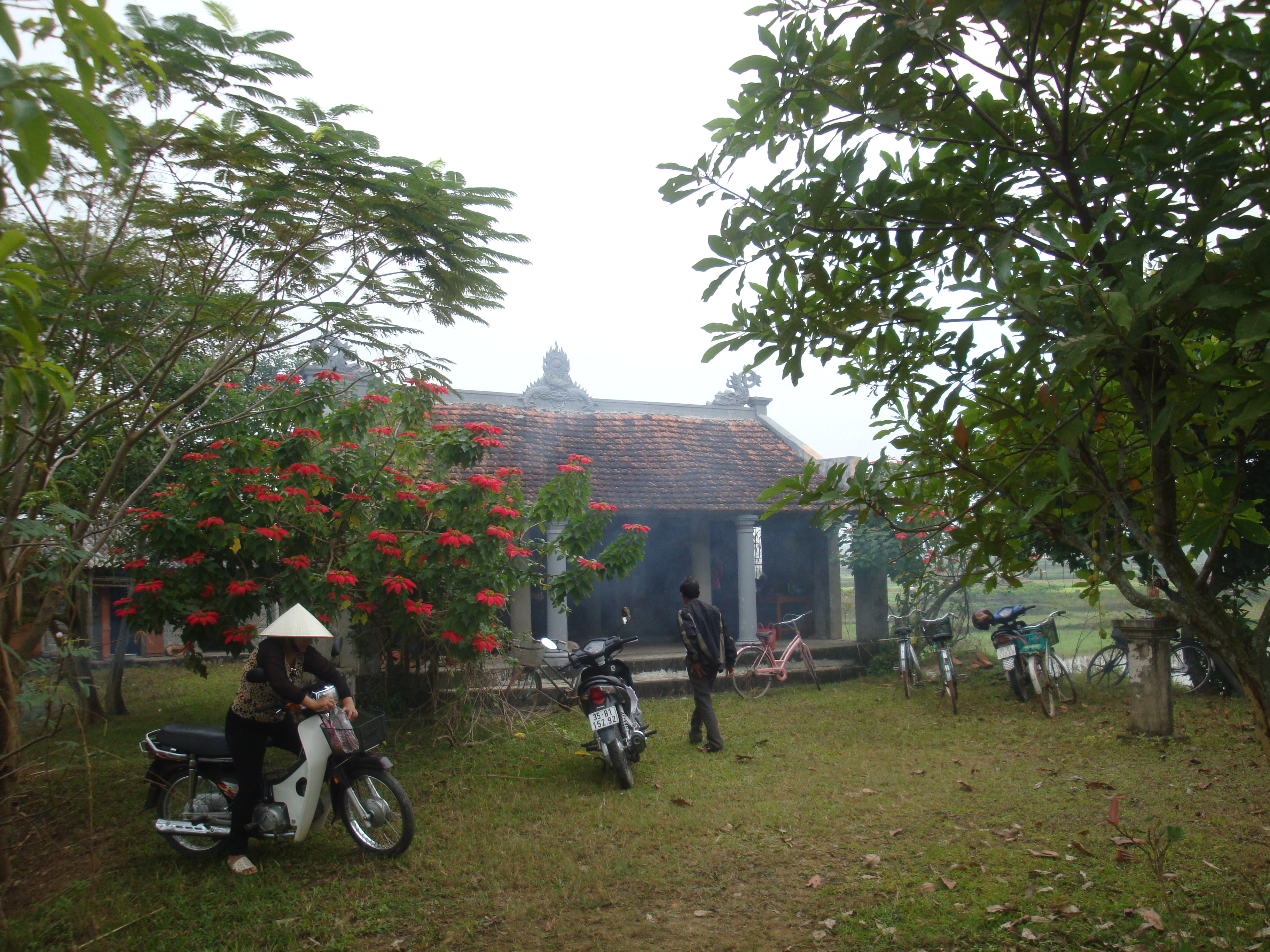 Đền thờ nữ tướng phụ trách quân lương, hậu cần của Vua Đinh Tiên Hoàng ở Gia Thủy, Nho Quan